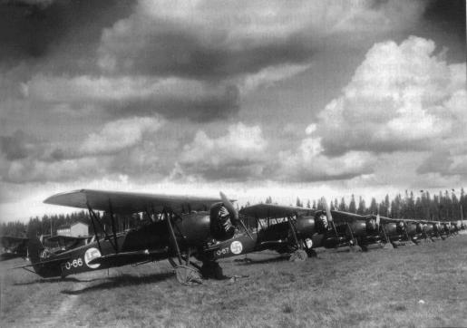 Fokker C.V-E